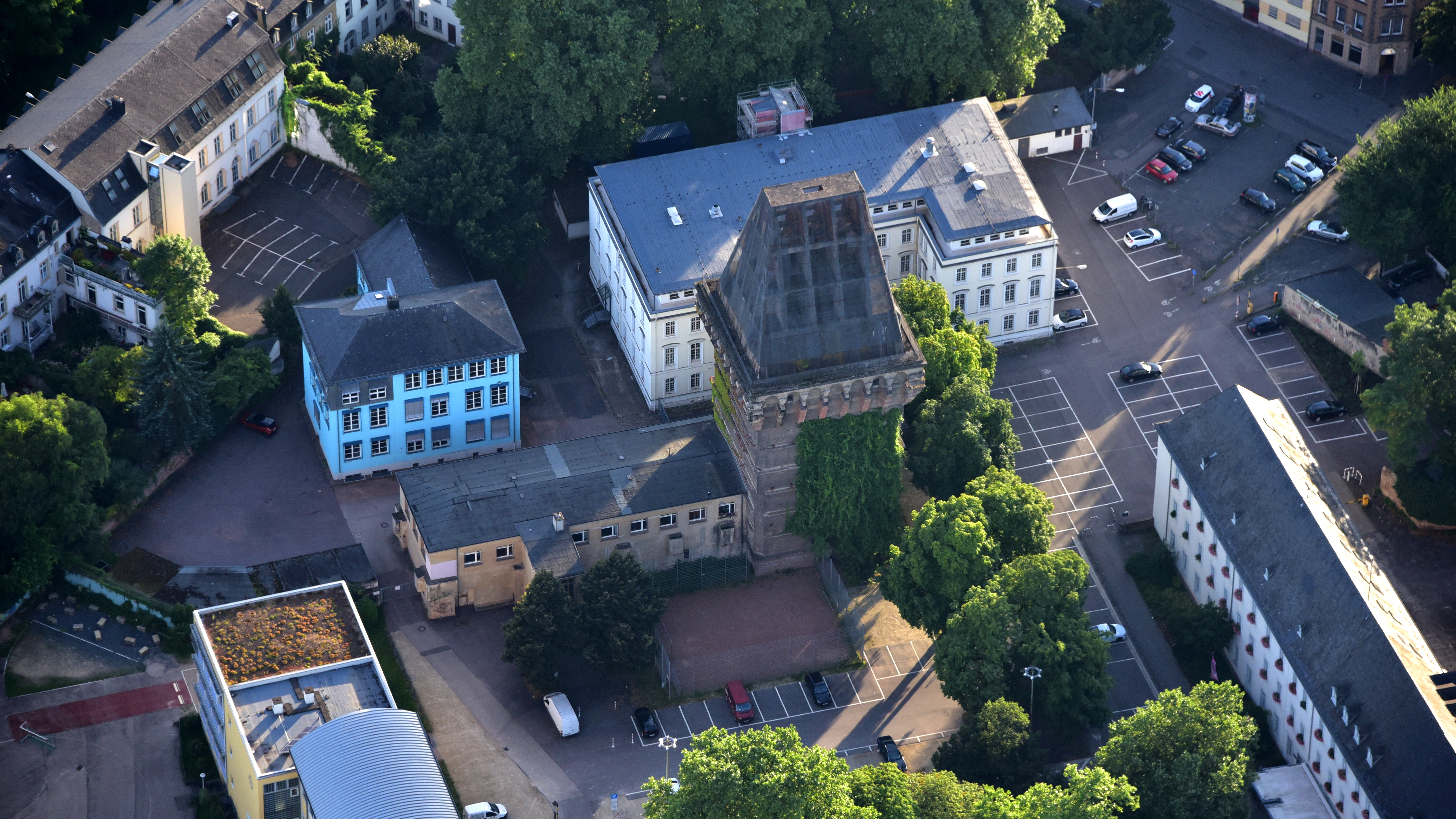 Trier, Hochbunker Augustiner Hof, Luftaufnahme (2016)